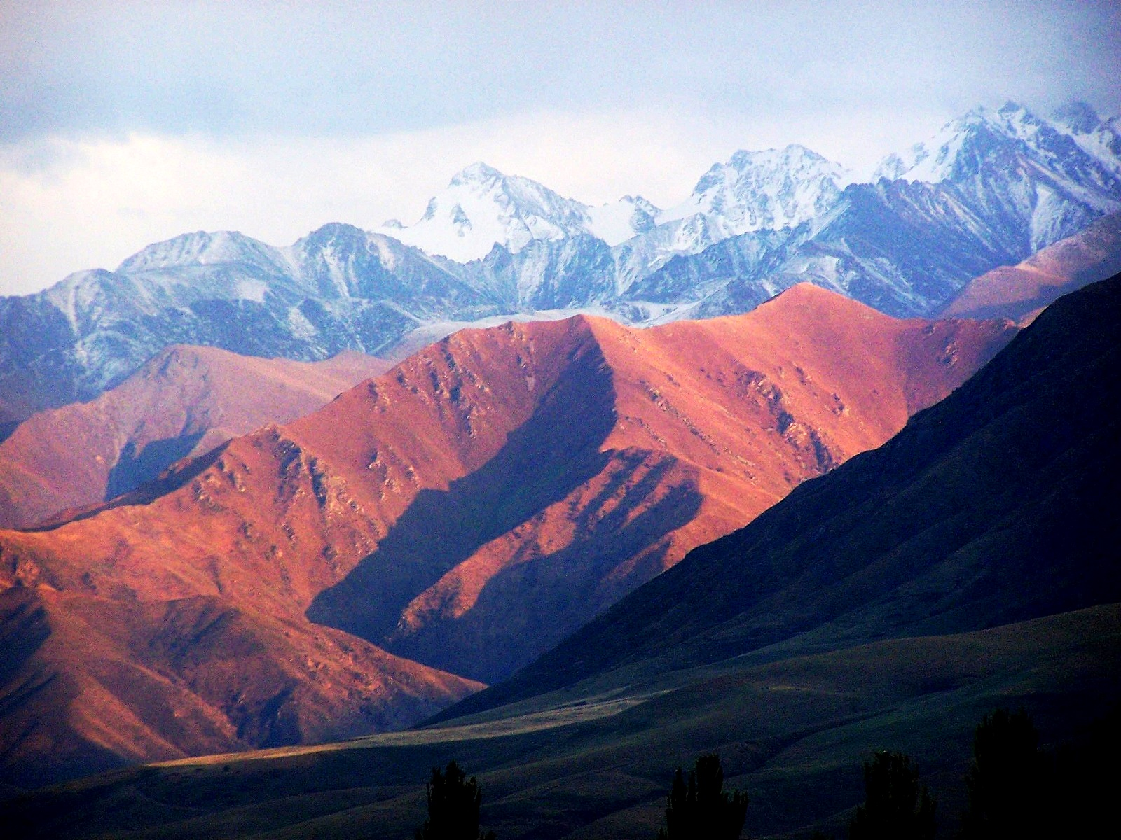 Kyrgyzstan Alatau Mountains